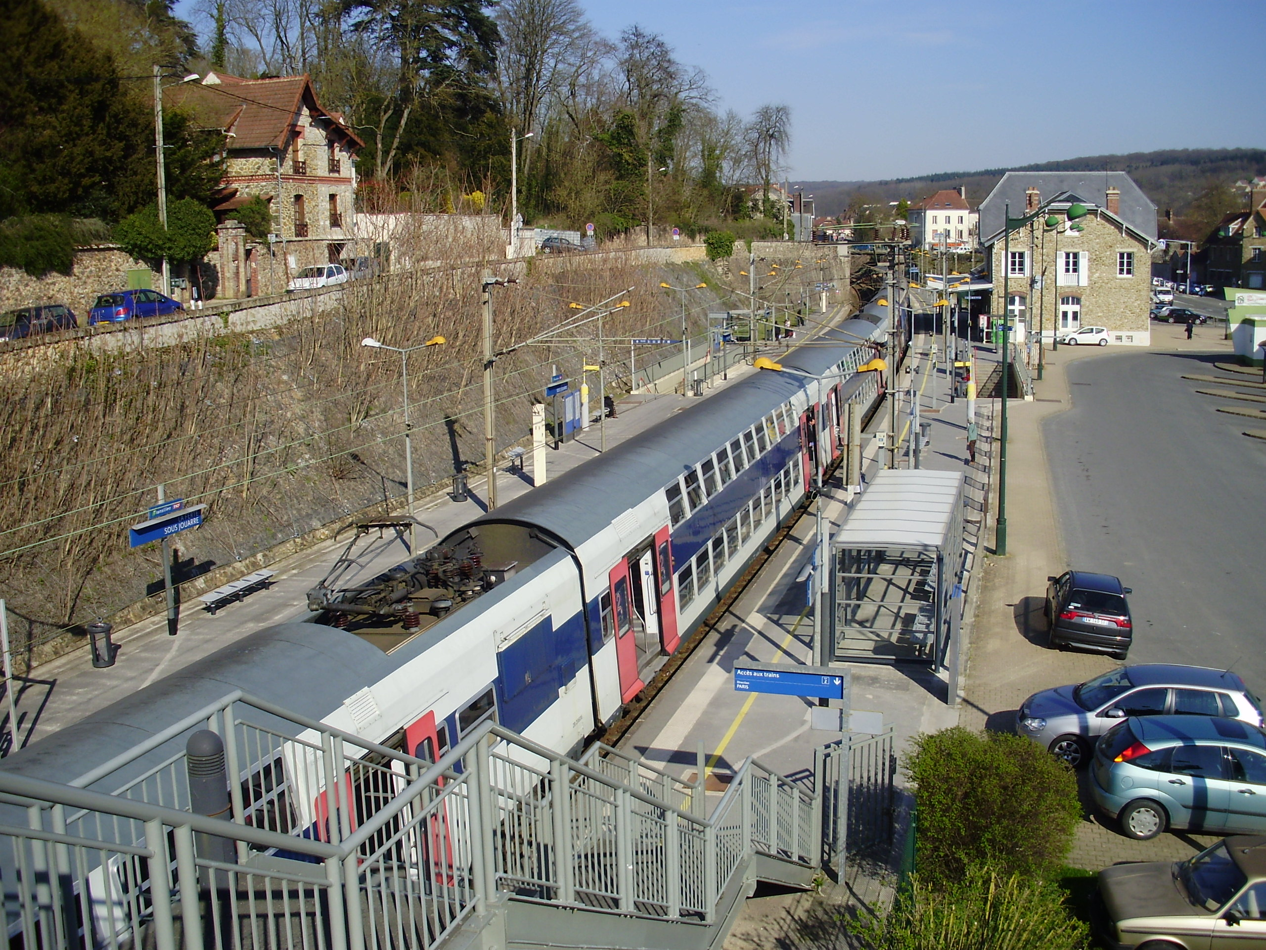 Gare de La Ferté-sous-Jouarre, Seine-et-Marne, France (Rame Z 20500 prête à partir vers Paris, vue depuis la passerelle à l'ouest du bâtiment voyageurs)